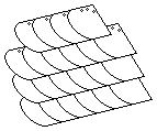 Rijndekking